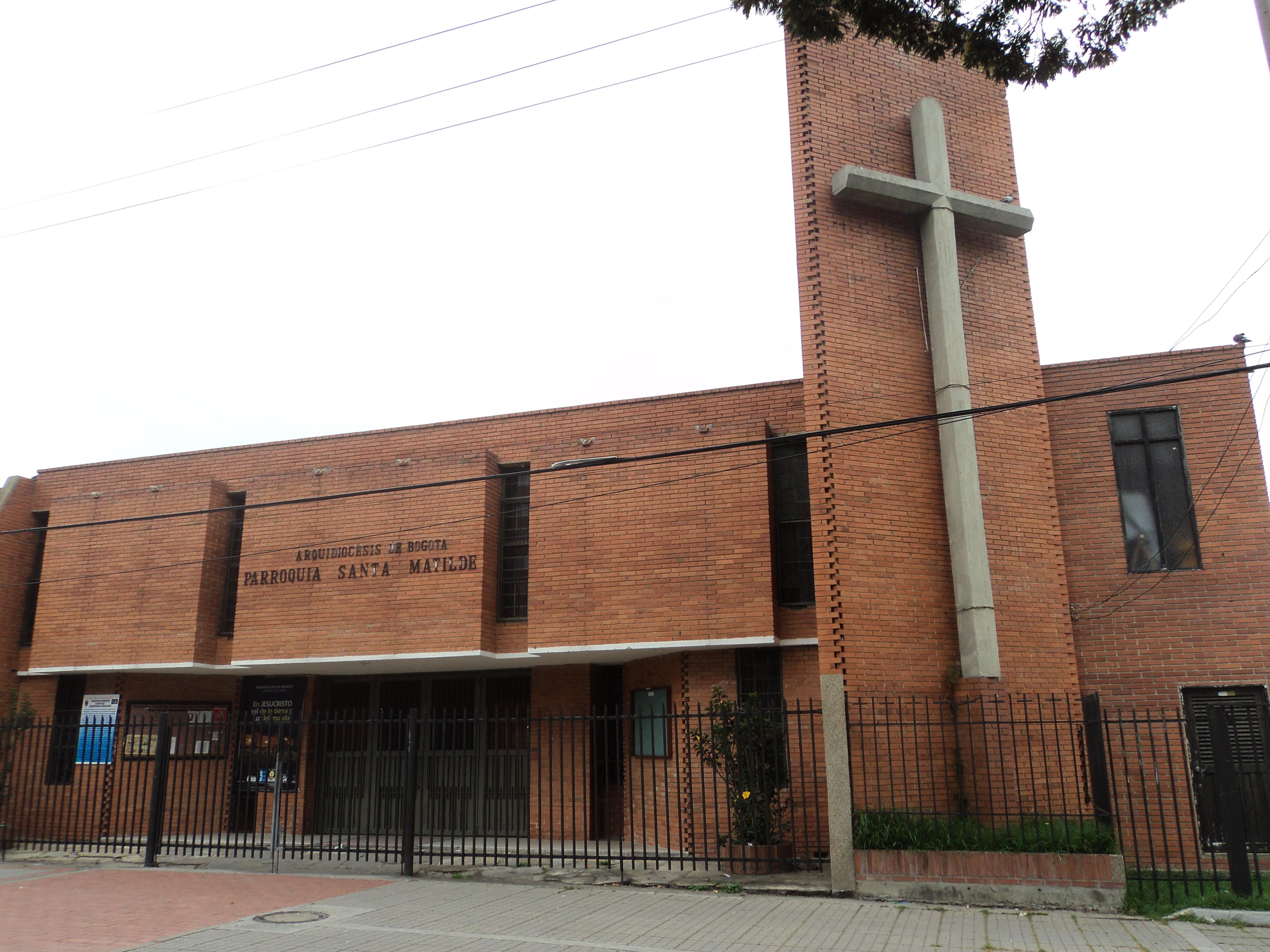 Iglesia Santa Matilde ubicada frente al parque de la 8tava